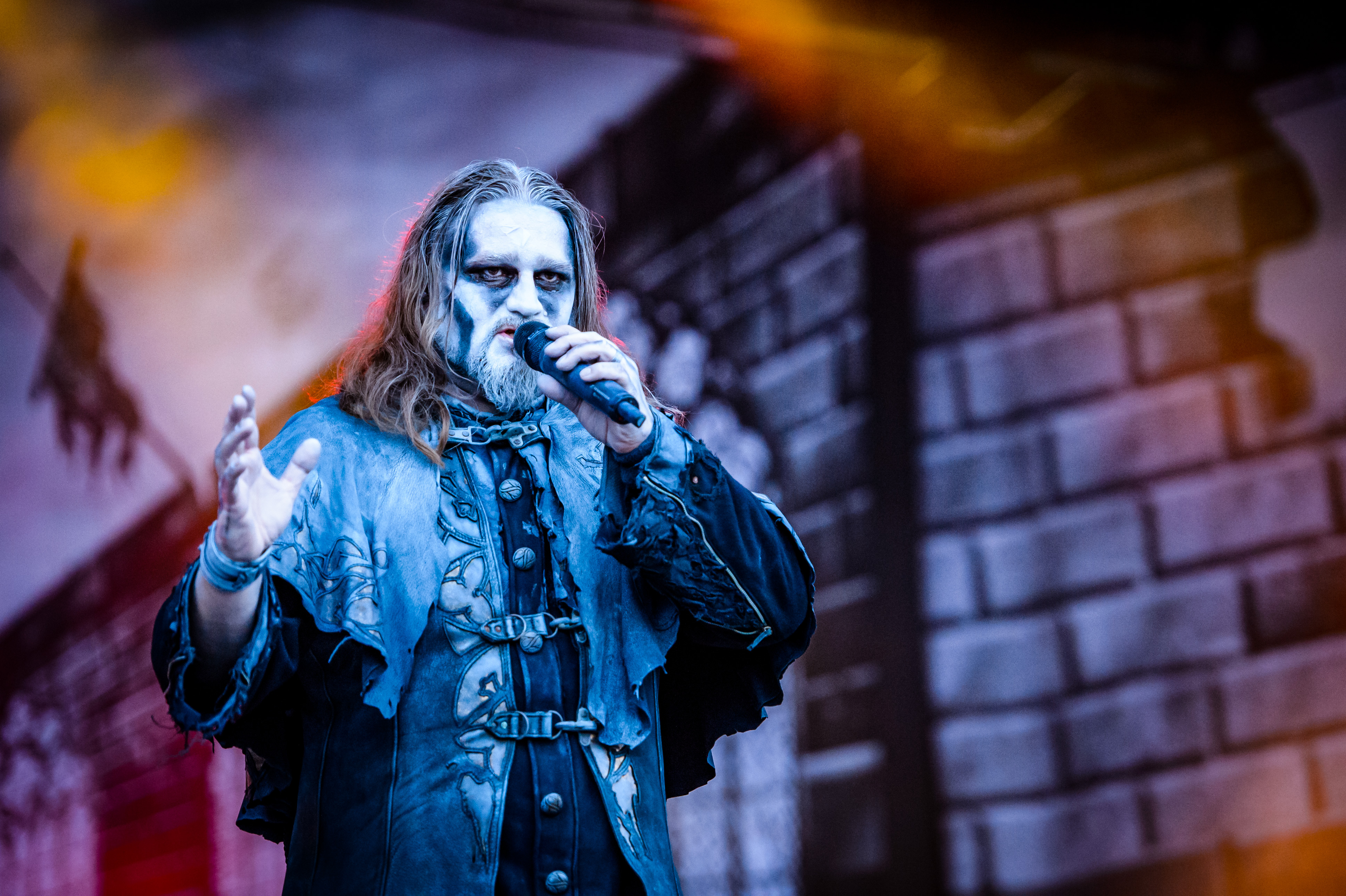 'Summer Breeze Festival 2017; Dinkelsbühl': 'Powerwolf'